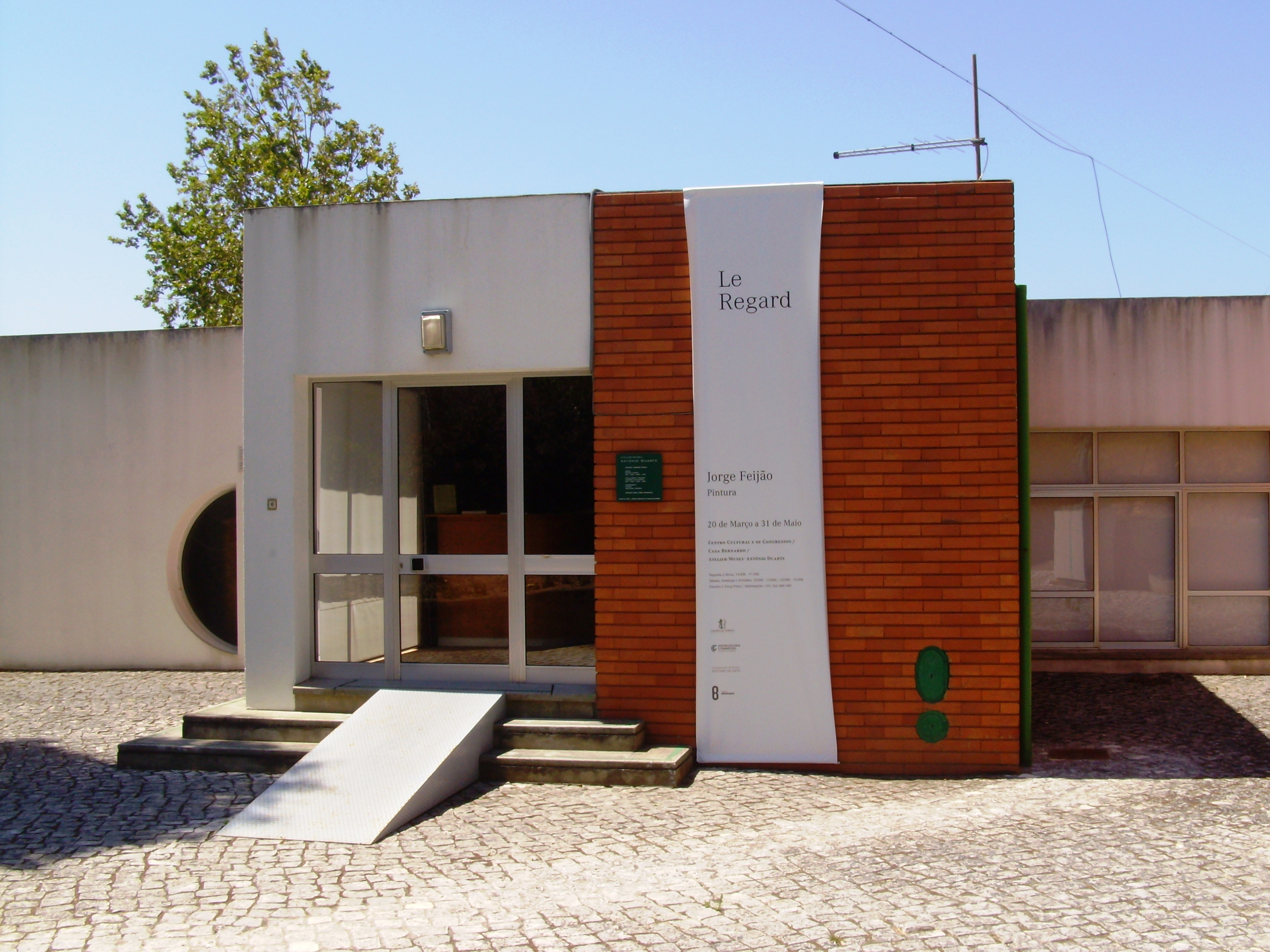 Atelier-Museu António Duarte, Centro de Artes, Caldas da Rainha, Distrito de Leiria, Portugal.